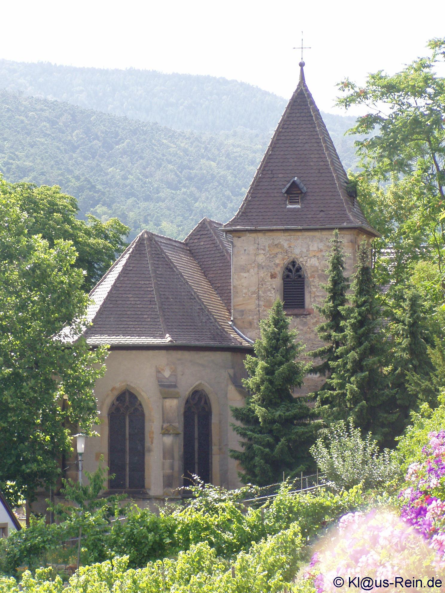 Bildbeschreibung: Nikolauskirche (Gimmeldingen) aus Nordosten Fotograf/Zeichner: Klaus Rein, 67435 Neustadt an der Weinstraße-Mußbach, Johann-Gottlieb-Fichte-Str. 29 Datum: 2005 Sonstiges: GNU-Freigabe für Wikipedia gem. persönlicher Mail von Klaus Rein an Benutzer:Mundartpoet vom 16. März 2006